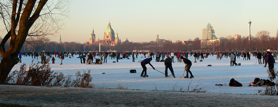 Eisfläche Maschsee Hannover